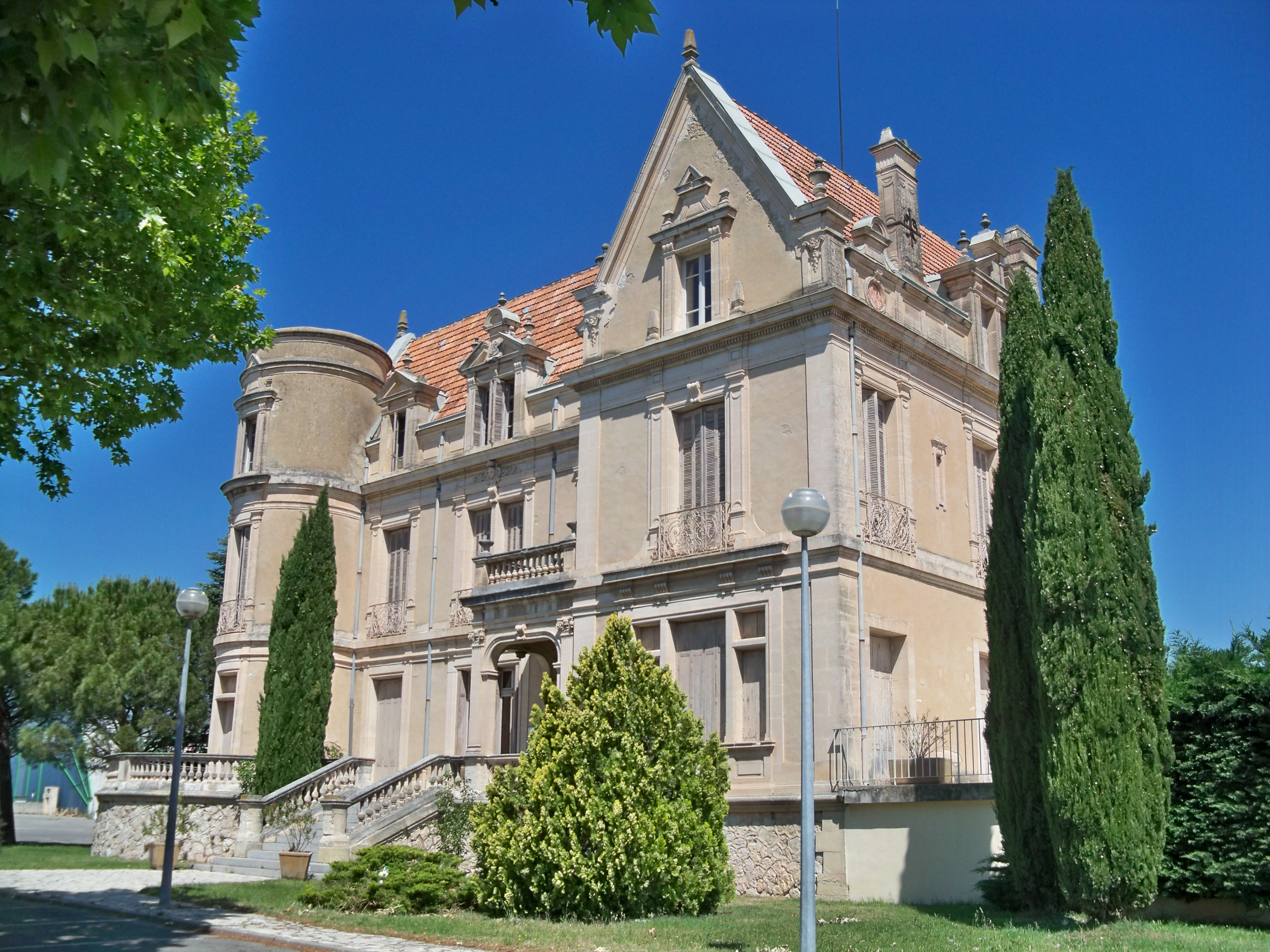 Marché gare de Carpentras, Vaucluse, France